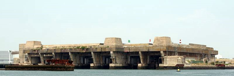 U-Boot Bunker Kéroman III in Lorient/Frankreich